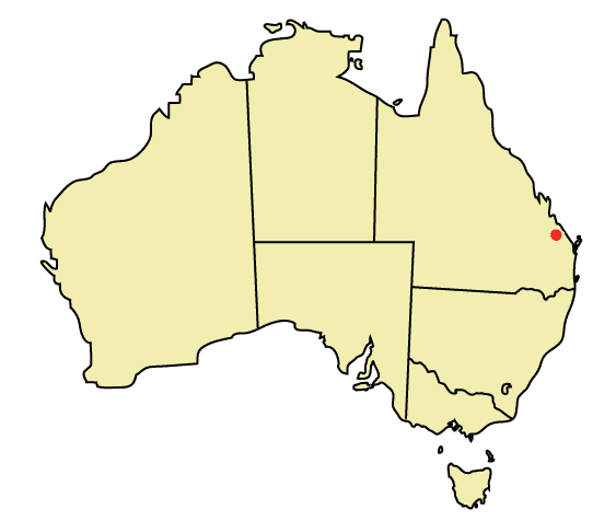 Locatie van Bundaberg in Australië